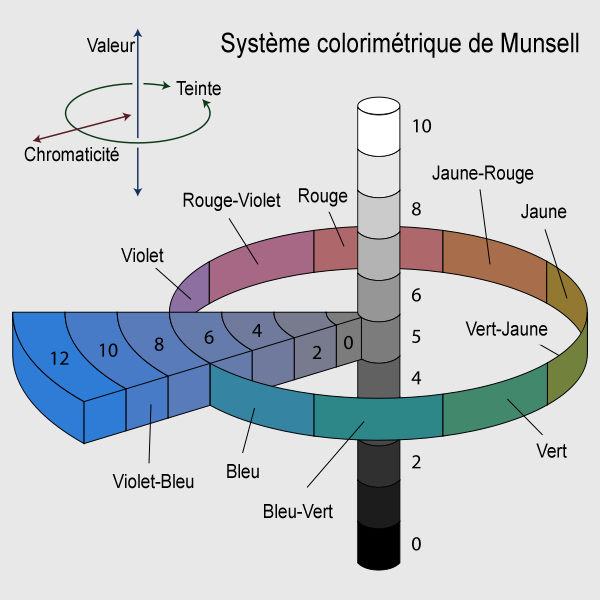 Traduction en français du fichier original Munsell-system.svg sur wikimedia commons